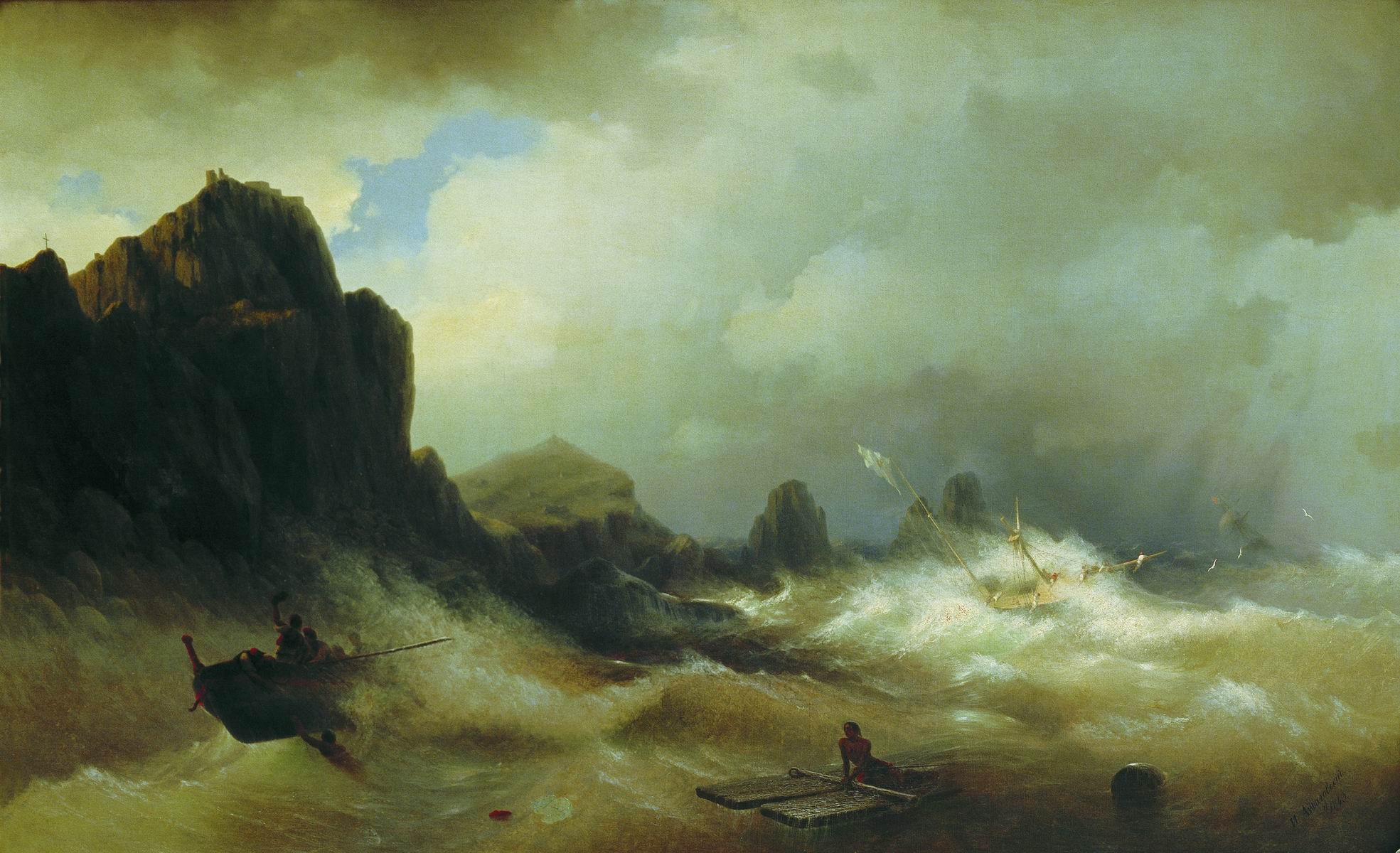 Кораблекрушение. 1843 Холст, масло. 116х189см. Феодосийская картинная галерея им. И.К.Айвазовского, Феодосия